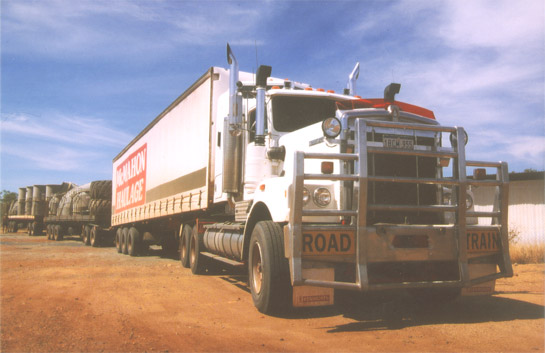 Roadtrain in Australien